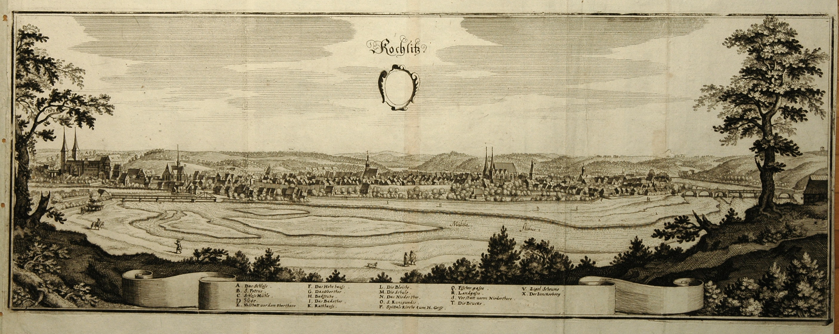 Rochlitz, Kupferstich 18,5 x 51 cm von Merian 1650